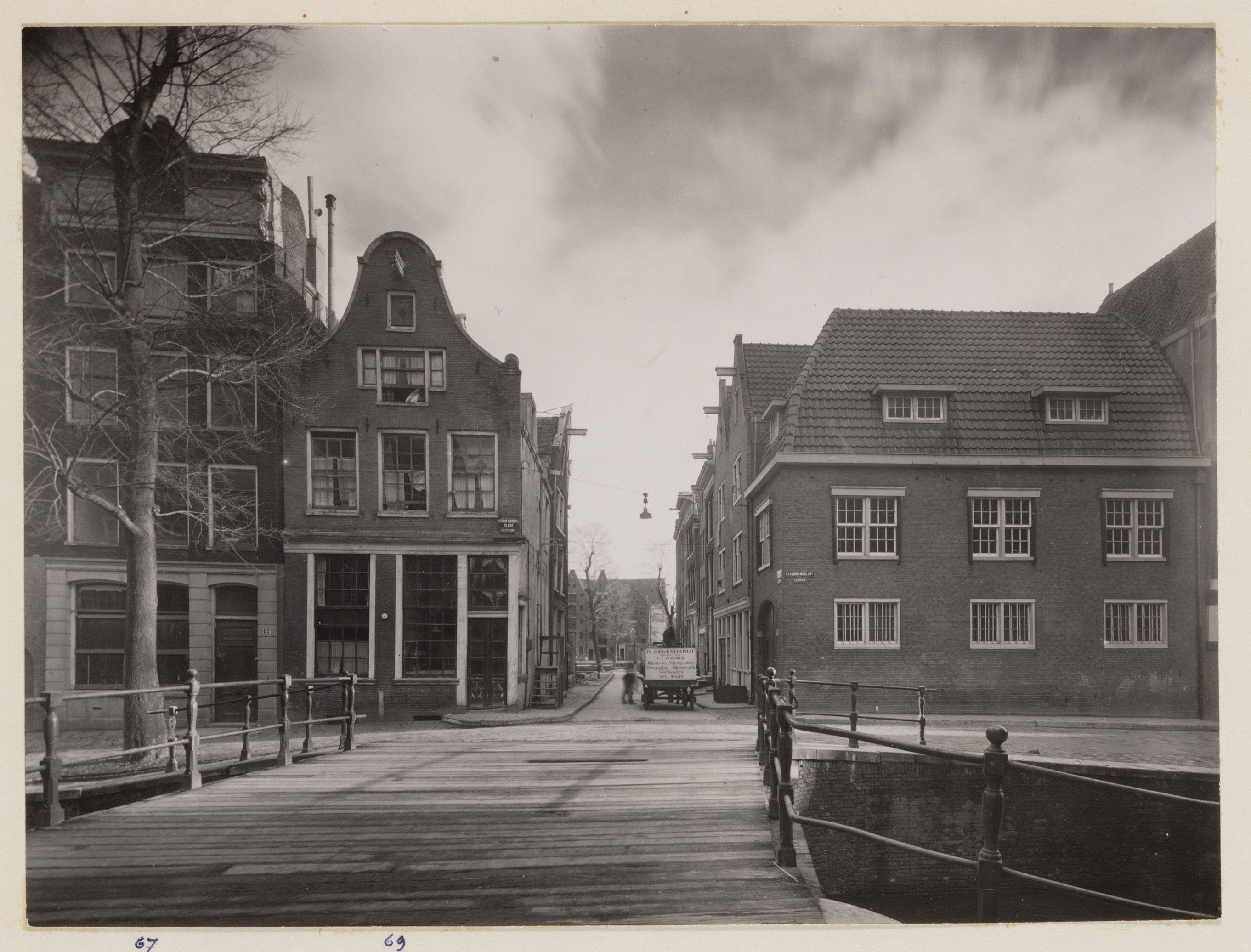 Beschrijving Krom Boomssloot 67-69 (v.l.n.r.), gezien in oostelijke richting In het midden de Korte Dijkstraat gezien naar de Oudeschans. Rechts het hoekpand Korte Dijkstraat 2. Op de voorgrond Brug 290. Documenttype foto Vervaardiger Onbekend Anoniem Collectie Archief van het Bureau Monumentenzorg: glasnegatieven en negatiefloze foto's Datering 13 februari 1946 Geografische naam Krom Boomssloot Korte Dijkstraat Inventarissen Afbeeldingsbestand 012000006613